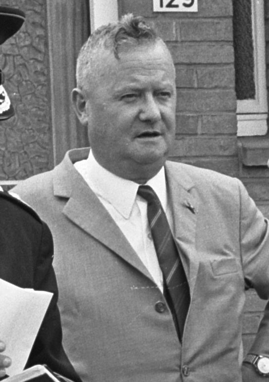 Sint Willebrord na de rellen. Minister Polak in gesprek met burgemeester P. Alberts en de inspecteur-generaal van het korps Rijkspolitie W. de Gast (links)